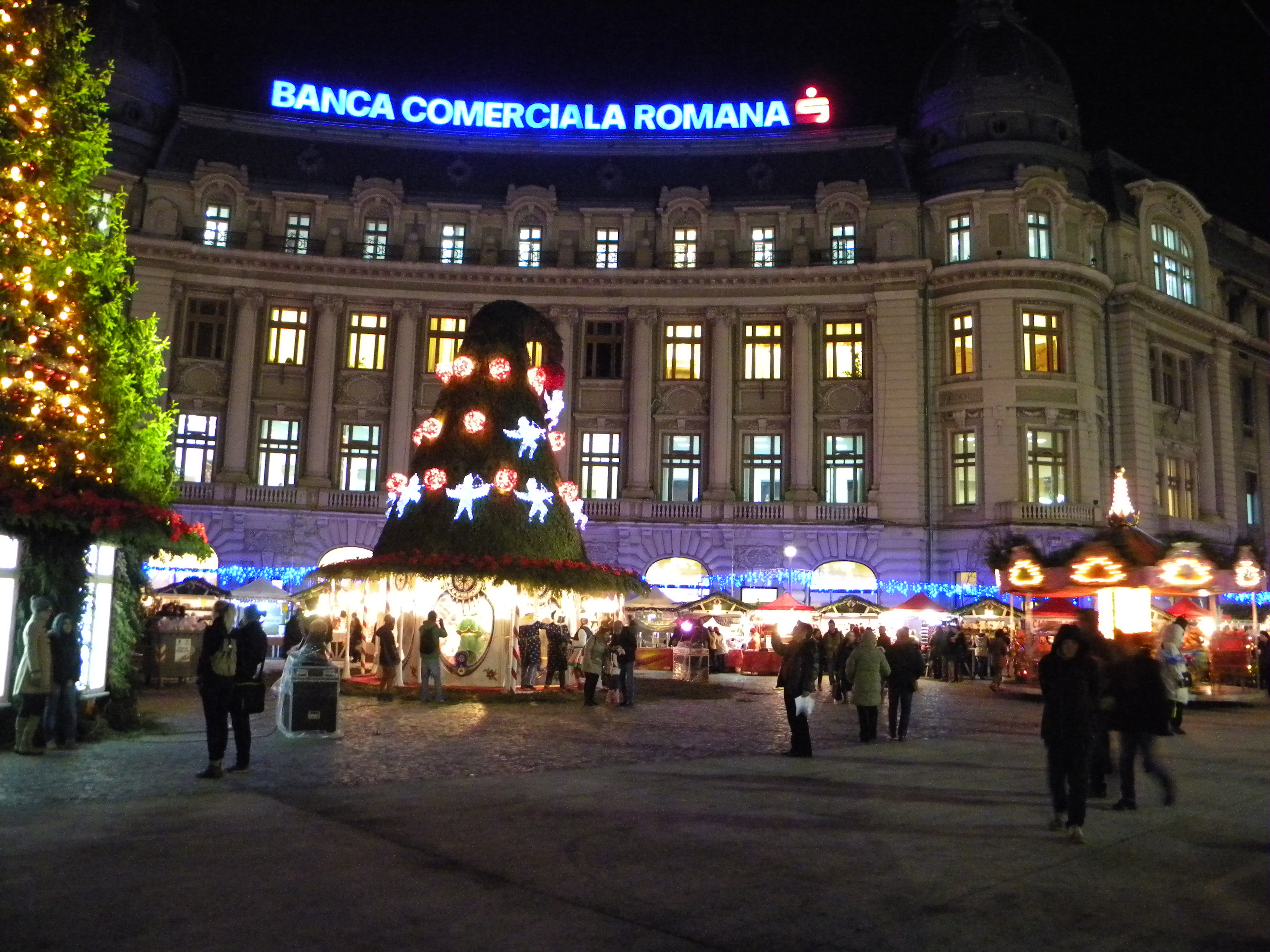 Bucuresti, Romania, Piata Universitatii, BCR, B-II-m-A-18675, (Dec. 2013) (3)